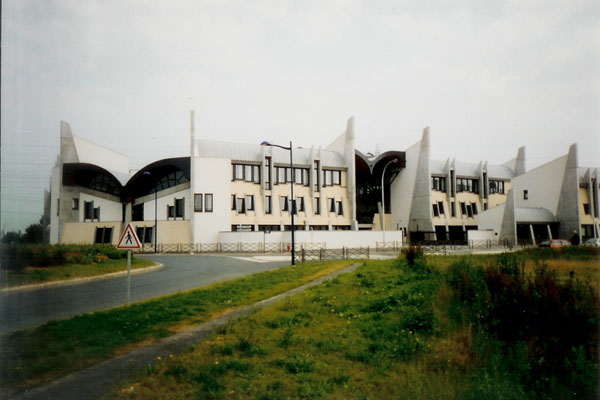 Collège de Cergy-le-Haut, France